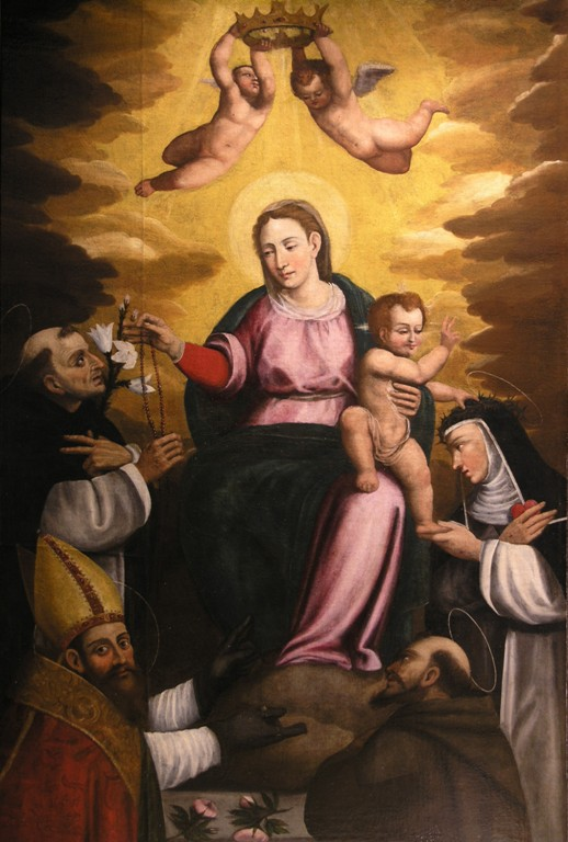 "Madonna del Rosario e Santi", dipinto di autore ignoto risalente alla prima metà del XVII secolo e raffigurante al centro la Madonna del Rosario col Bambino, San Domenico e San Martino sulla sinistra e Santa Caterina da Siena e San Francesco sulla destra. È situato al lato dell'Altare dei Morti della chiesa di San Martino di Tours (Gorno).